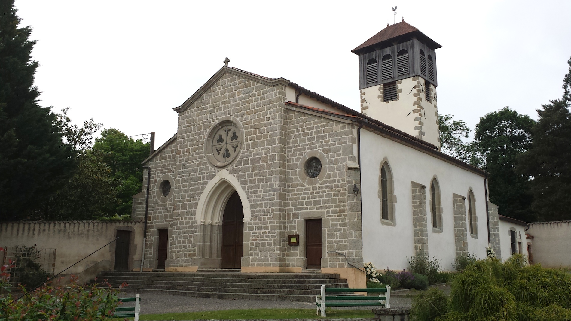 Église de Poncins (Loire)